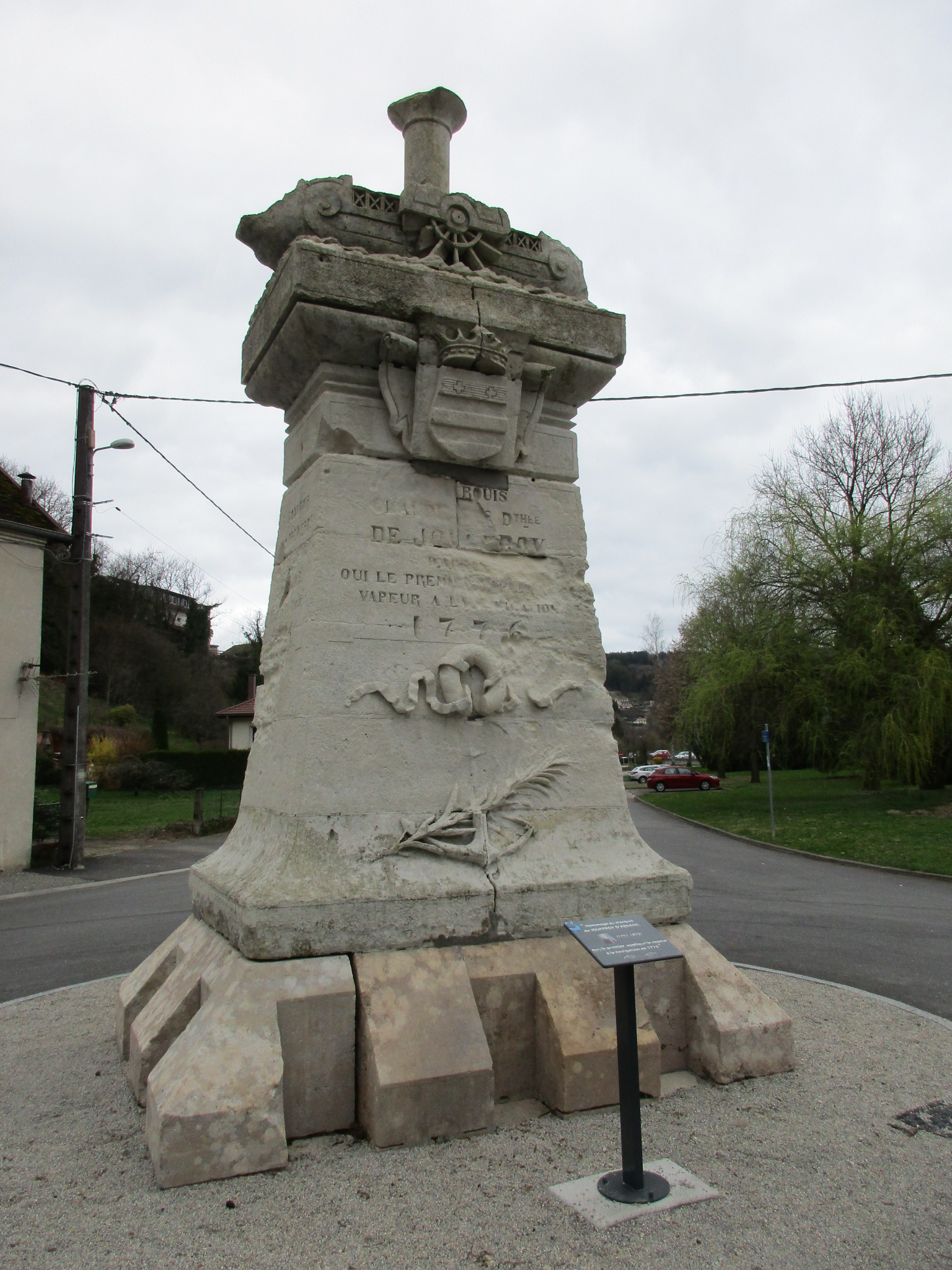 Monument de Baume-les-Dames, à la mémoire de Claude François Jouffroy d'Abbans